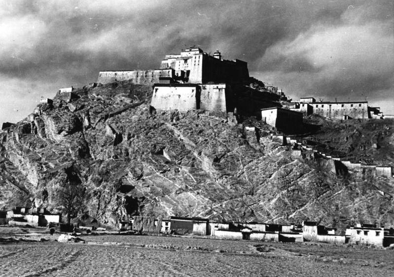 Gyantse, Dzong